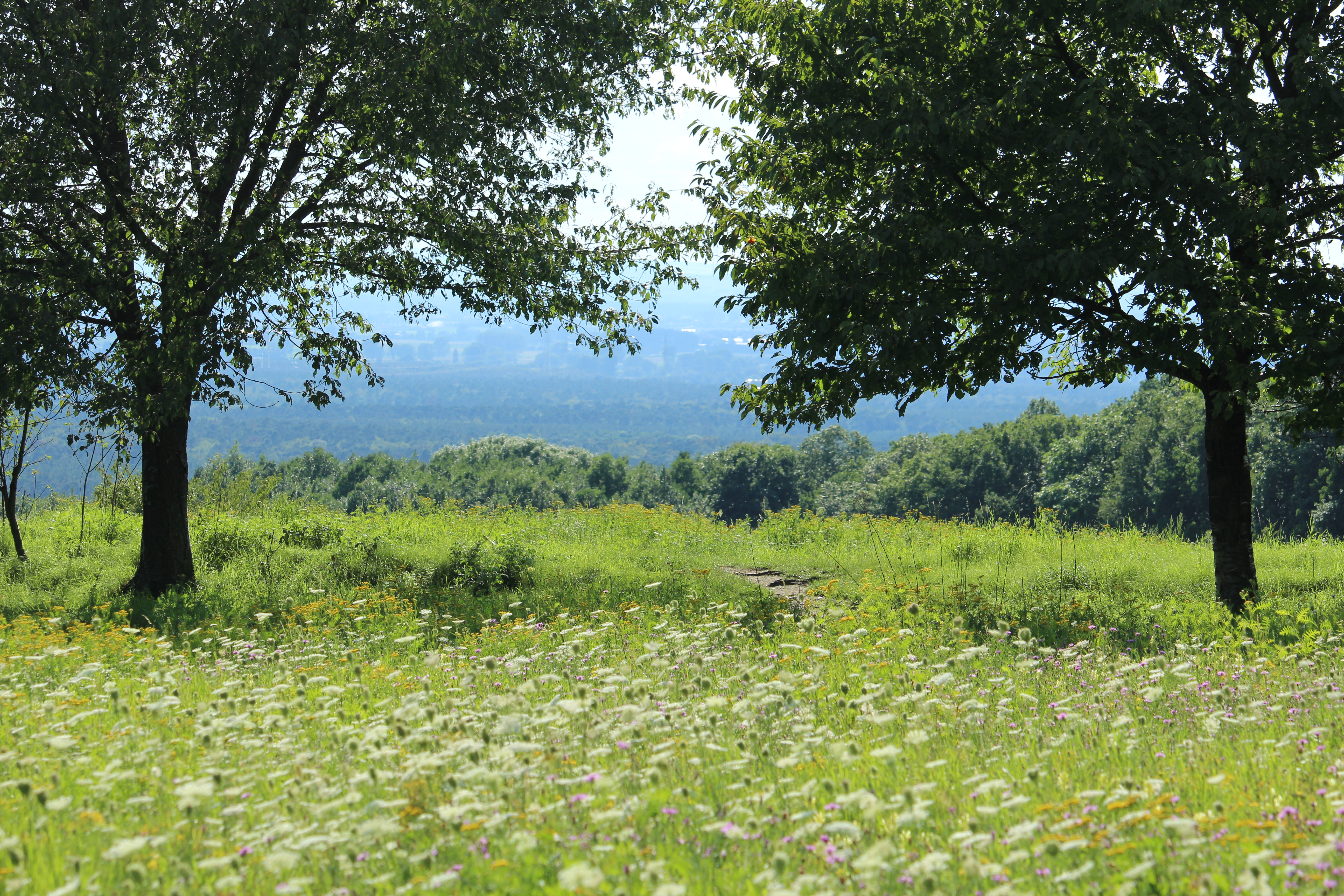 Matthias Lothhammer Blick vom Prinzenberg Richtung Westen auf Eberstadt und Rheinhessen im FFH Gebiet Darmstadt Eberstadt Prinzenberg und Eichwäldchen